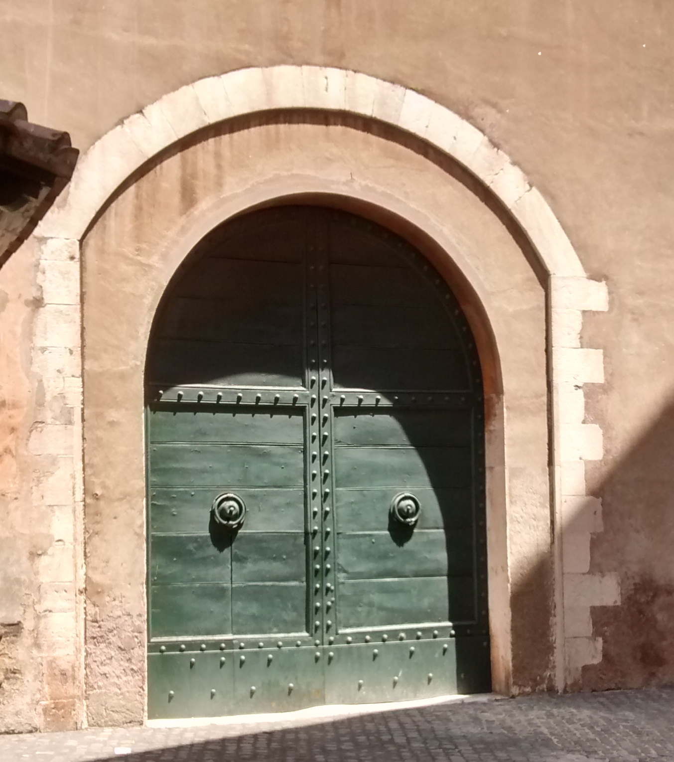 Porta San Pellegrino